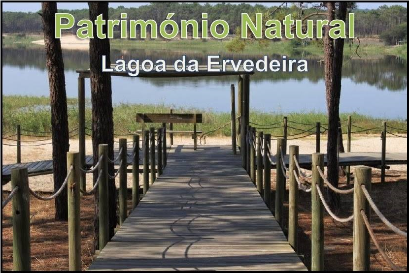 A Lagoa da Ervedeira localiza-se junto da povoacao de Ervedeira, no extremo norte do Concelho de Leiria, freguesia de Coimbrao, possuindo uma area de 25 ha. Insere-se num espaço de rara beleza - situada num cordao dunar, entre as Matas Nacionais do Urso e do Pedrogao. A Lagoa é um destino de férias muito procurado durante o período estival para praia e banhos ou passeios e lazer, e também para a prática de pesca desportiva e de desportos náuticos, como o windsurf.